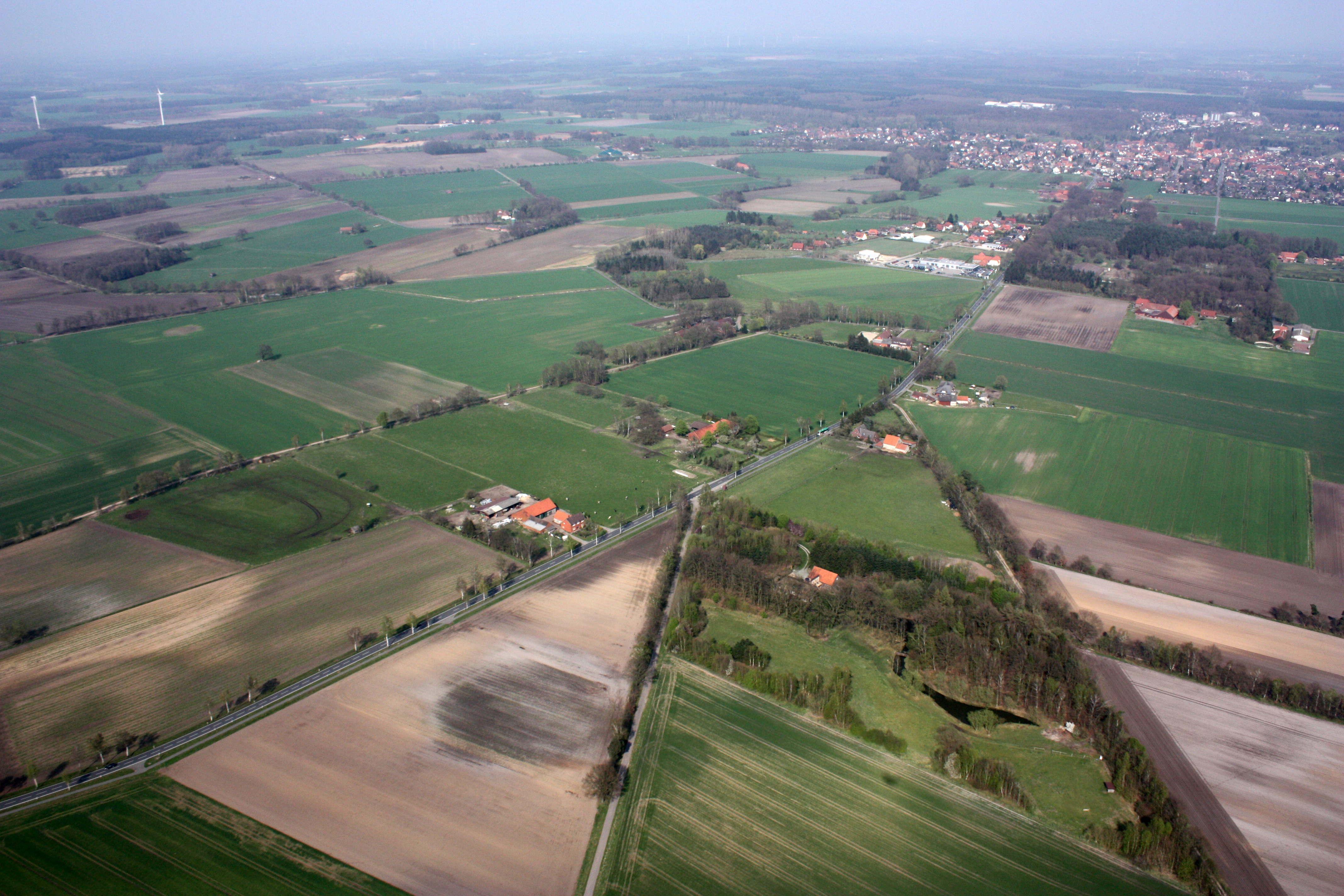 Luftbild von Bassum